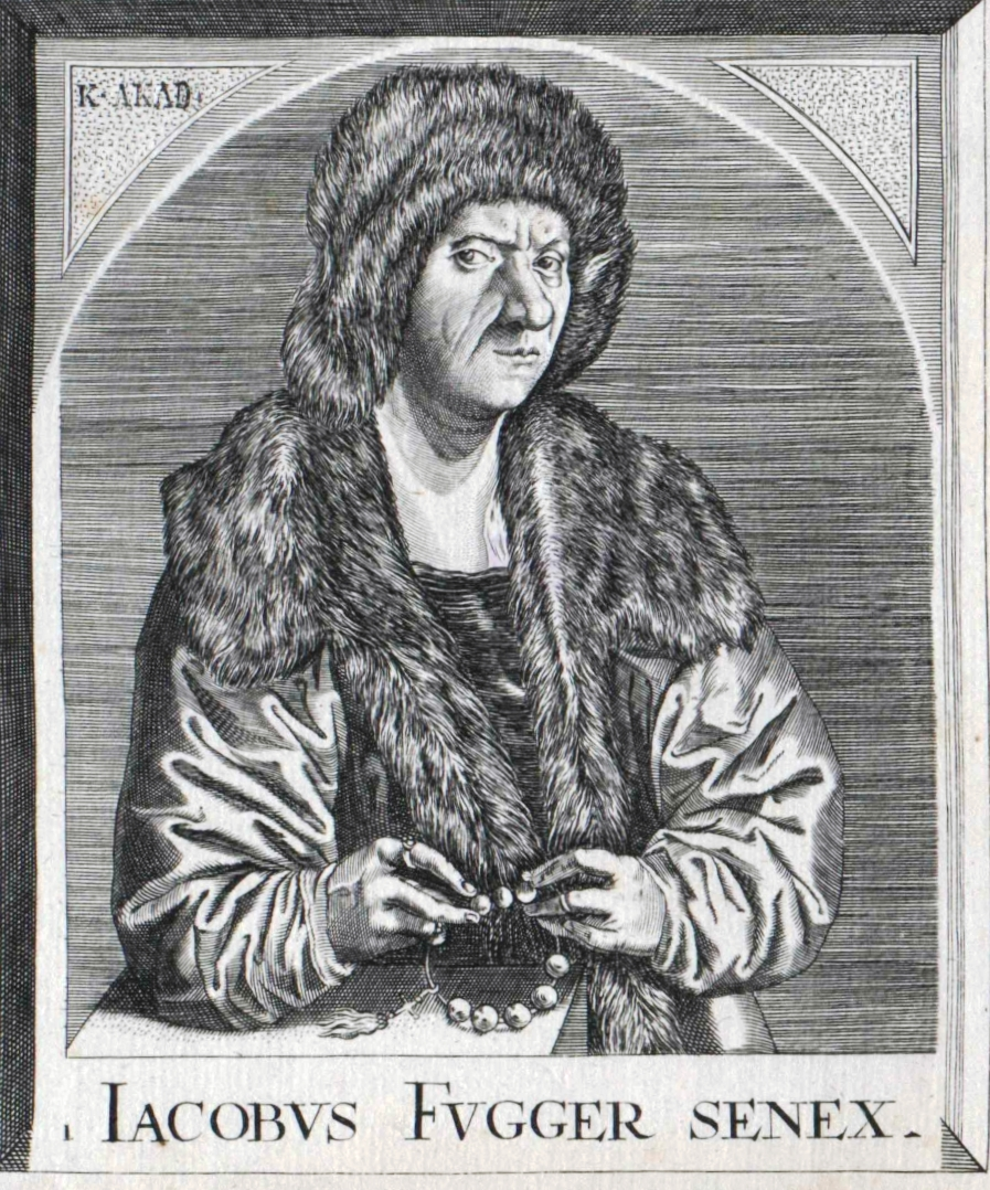 Portrait Jakob Fugger der Ältere